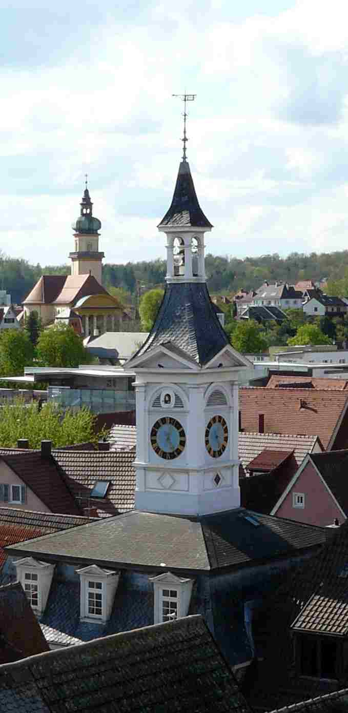 Blick auf den Turm des historischen Rathauses in Aalen, im Hintergrund die Salvatorkirche